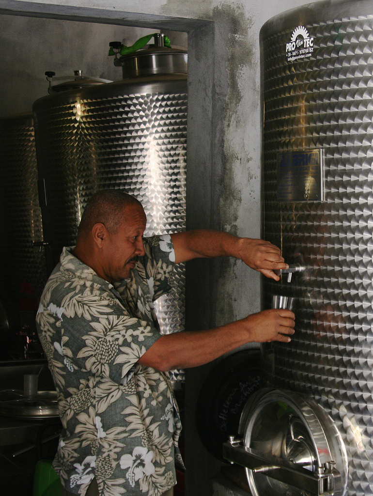 Eduino, le plus important vigneron à Chã das Caldeiras